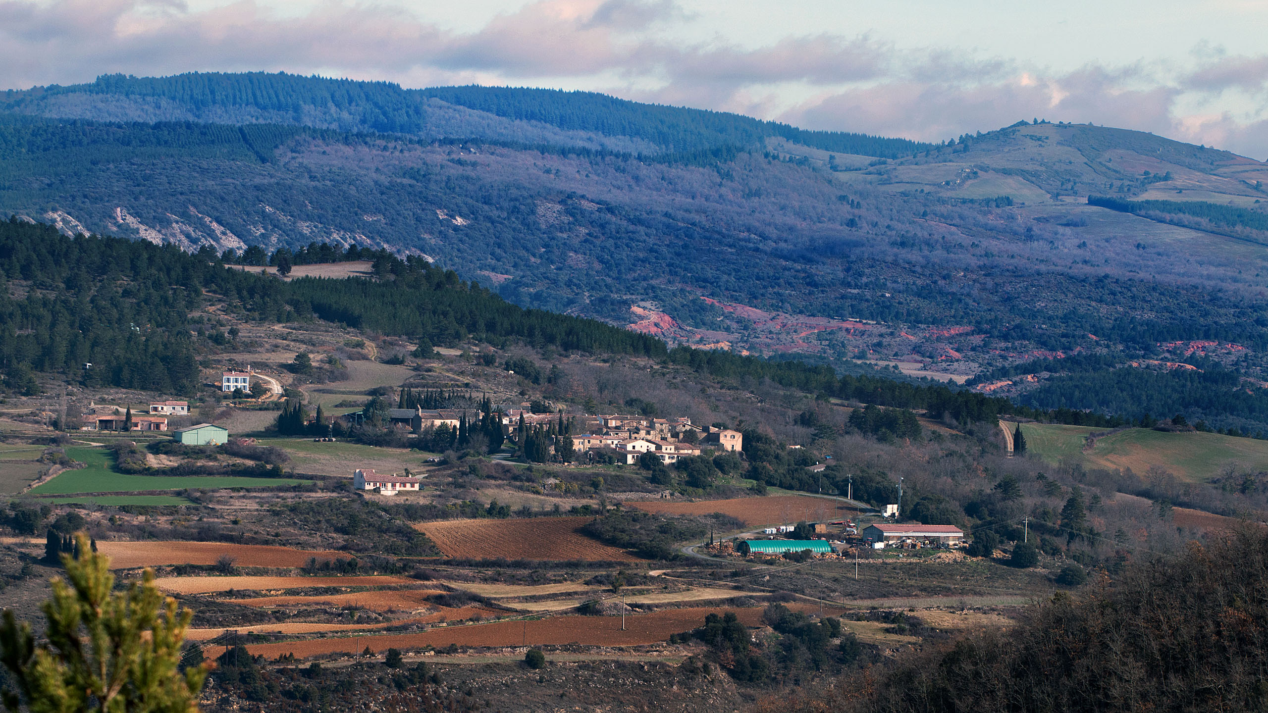 Le village en 2017